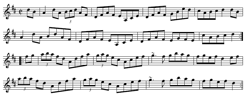 Notenbeispiel für einen Reel *Quelle: ABC-Tune konvertiert mit Muse *Lizenzstatus: Public Domain)